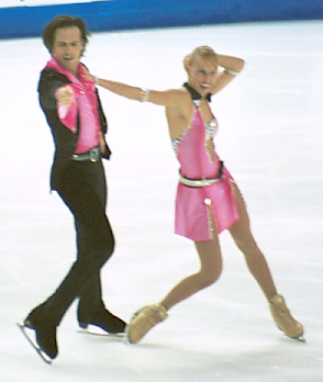 Barbara Fusar Poli and Maurizio Margaglio compete at the 2001 Grand Prix Final.